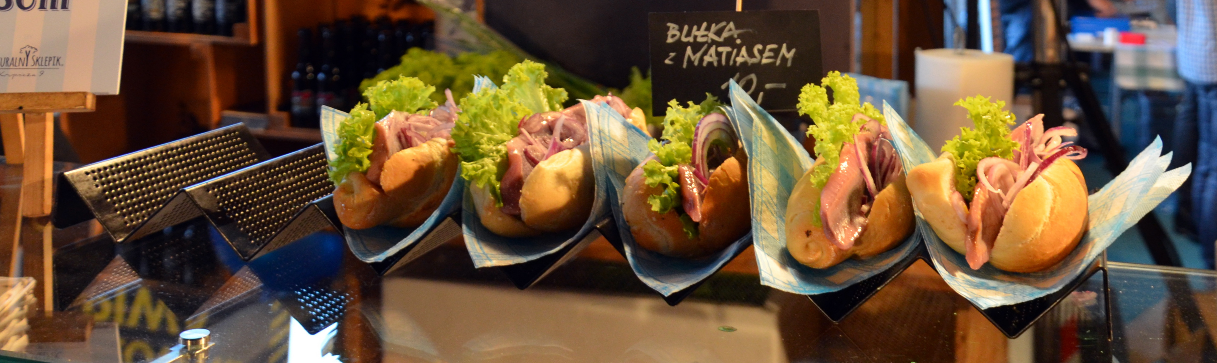 Matjeshering im Brötchen